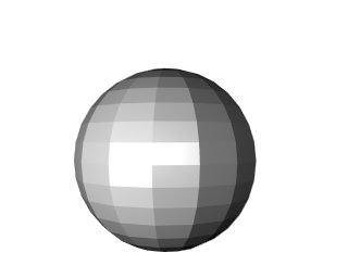 Un exemple d'ombrage plat. Source Image créée avec Blender (sous Linux).